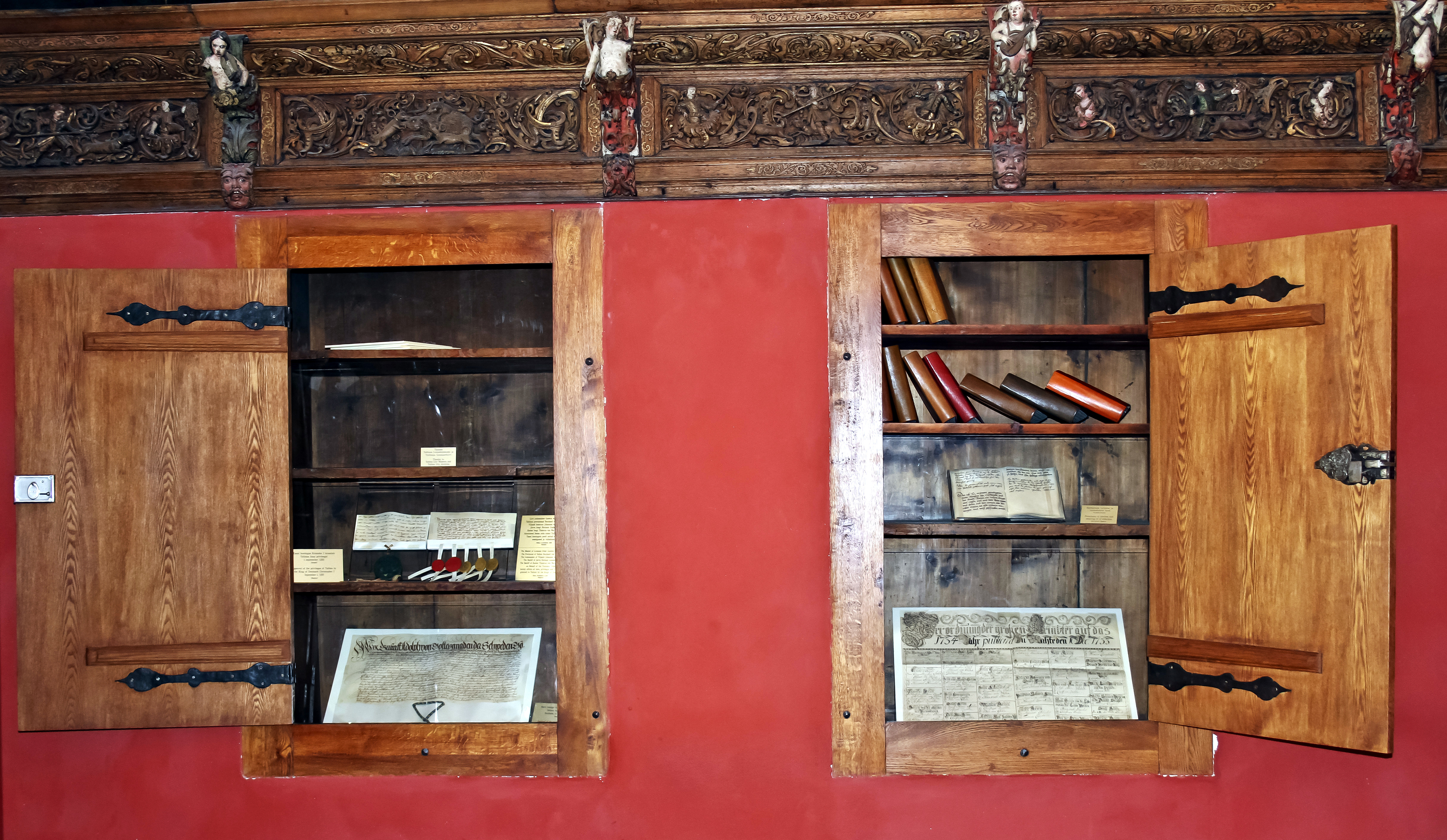 Reval, im Rathaus, 1. Stock